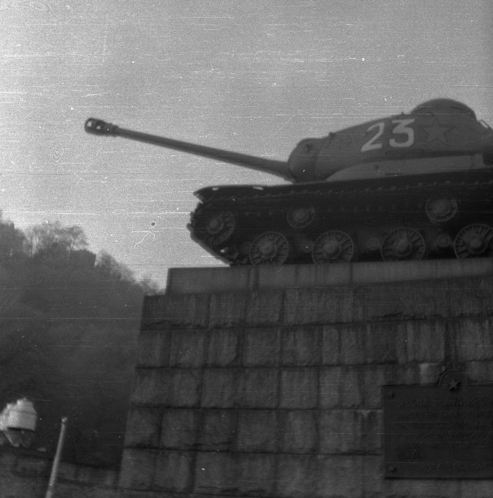 Praha, Smíchov, náměstí Sovětských tankistů, památník sovětských tankistů.